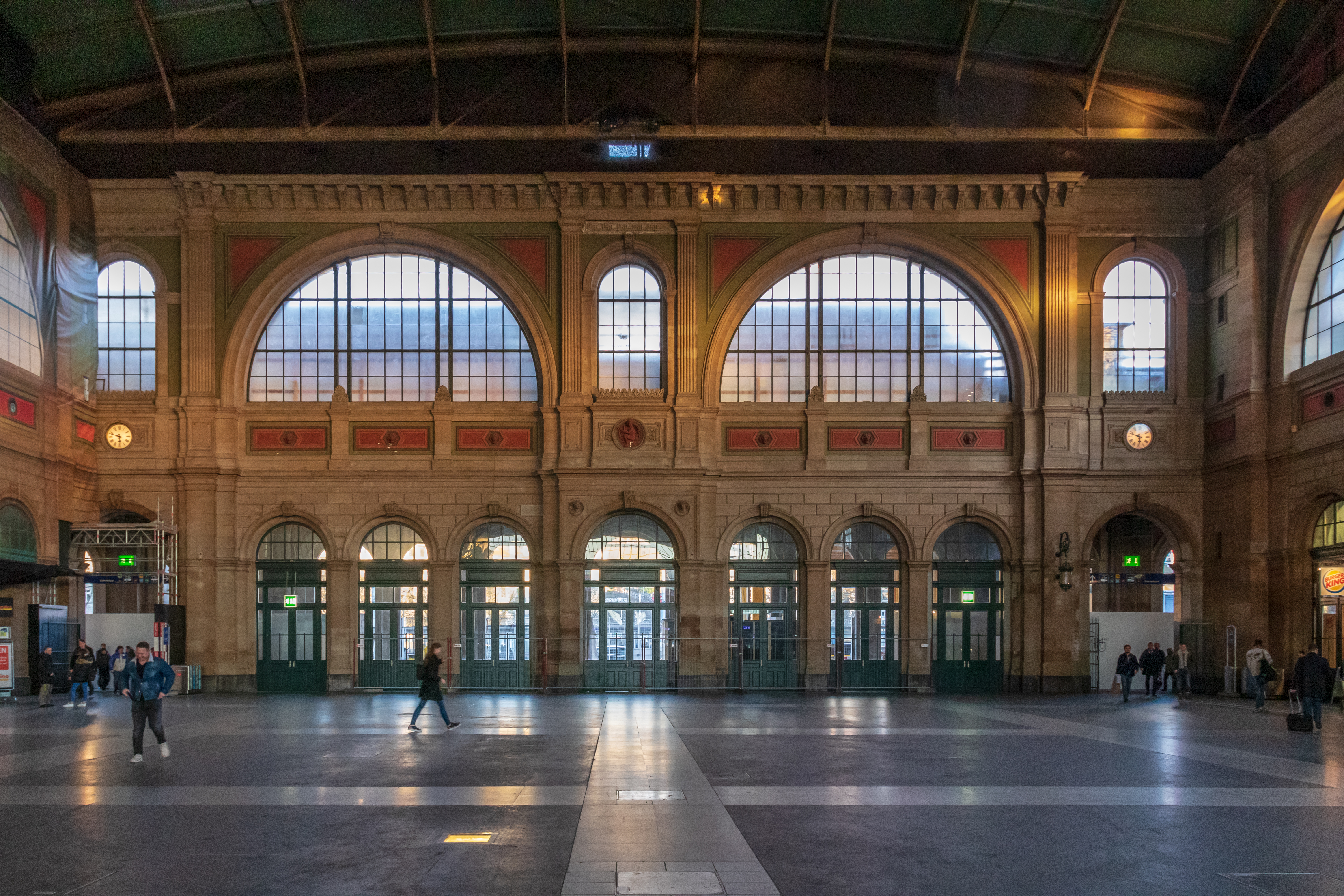 Zürich Hauptbahnhof – Eingangshalle